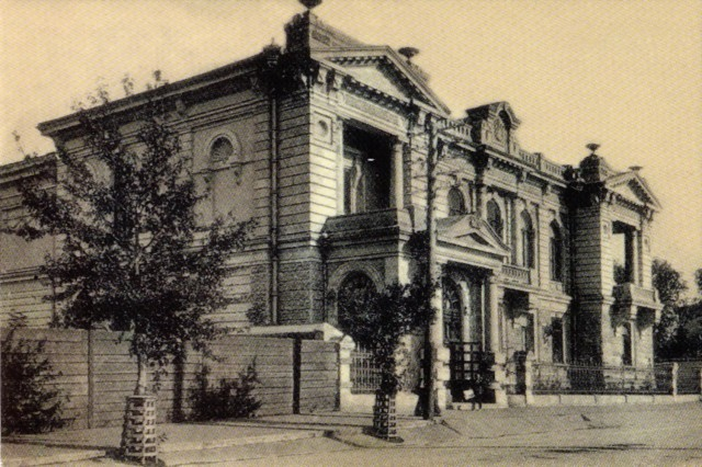 Особняк Наумова в Самаре. В 1918 году - резиденция Комитета Членов Учредительного собрания